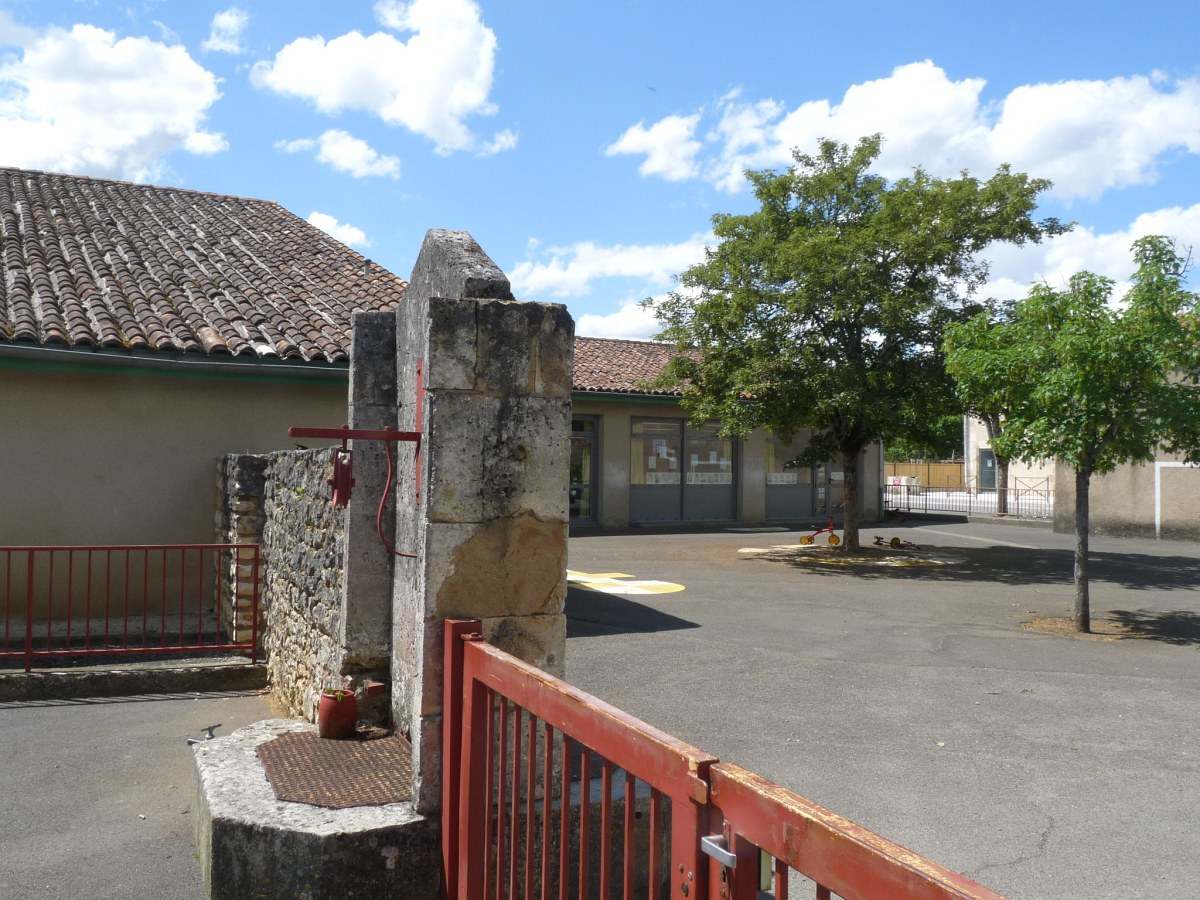 Ecole d'Agris, Charente, France